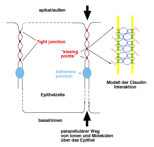 Schematische Darstellung der junctions in einer Epithelzelle, selbst erstellt